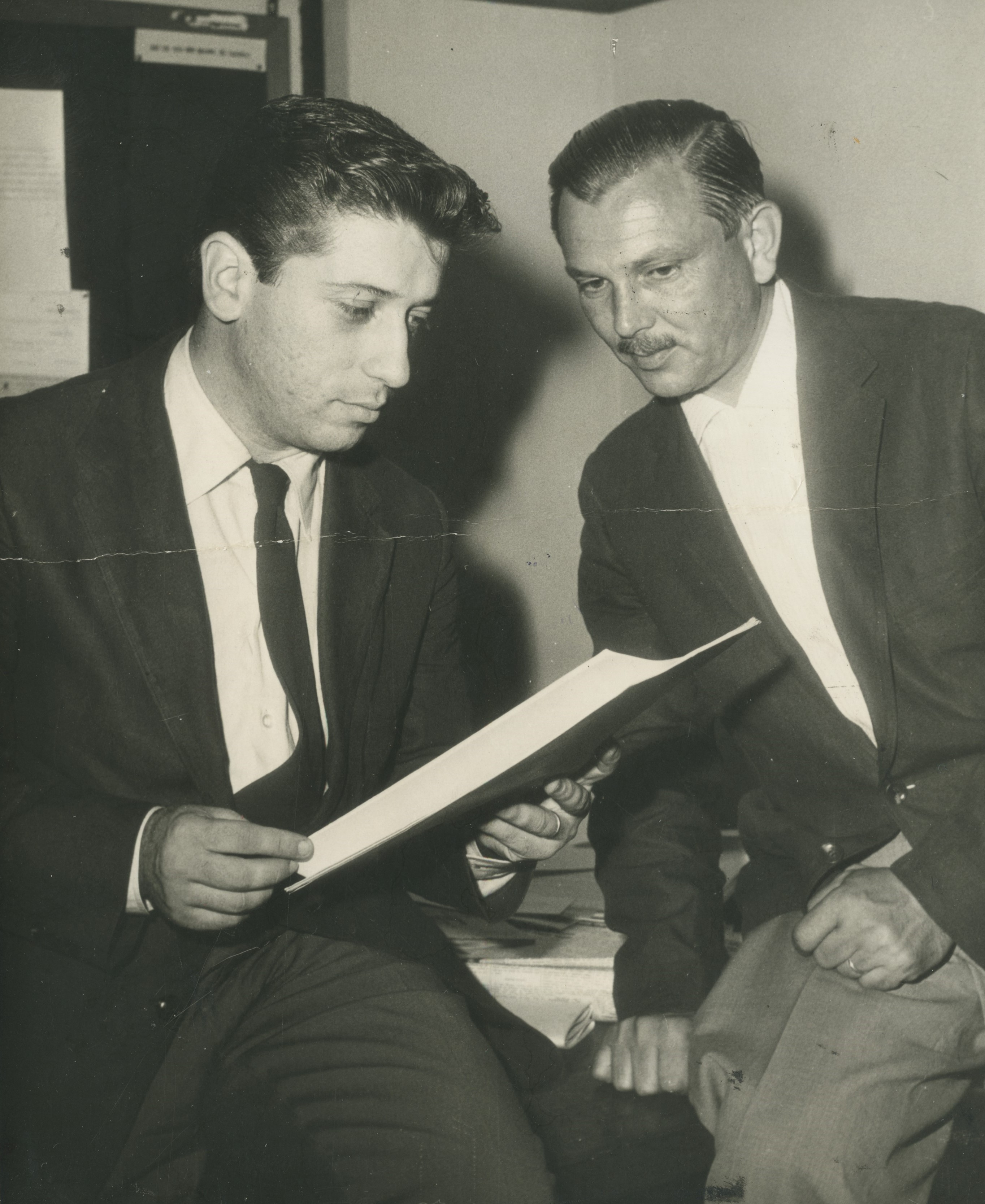 Fotografia do Fundo Correio da Manhã, sob a guarda do Arquivo Nacional.